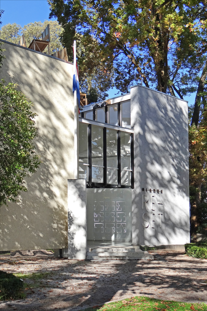 Exposition Re-Set dans le pavillon national des Pays-Bas (2012) Inside Outside / Petra Blaisse Commissario: Netherlands Architecture Institute. Curatore: Ole Bouman. L'artiste Petra Blaisse n'a pas préparé une exposition sur l'architecture, avec maquettes, photos et dessins, destinée à être présentée au sein du pavillon comme c'est le cas partout ailleurs. Elle a voulu transformer le pavillon en lui-même et recréer ses espaces intérieurs de manière dynamique en faisant circuler toutes les 96 secondes des rideaux colorés. Les rails de guidage permettent aux rideaux de se trouver dans de nombreuses combinaisons, selon des obliques, des perpendiculaires ou des parallèles aux murs. Le passage d'un rideau devant l'autre produit des effets lumineux qui font miroiter l'atmosphère et change en quelques secondes la perception que les visiteurs peuvent avoir de l'intérieure du pavillon. Selon les positions des rideaux, des effets sonores se produisent rythmant les déplacements. C'est un pari réussi qui se révèle d'une grande originalité et qui rend sensible le discours abstrait sur la création architecturale avec une économie remarquable de moyens. Site du pavillon des Pays-Bas __________ Le pavillon des Pays-bas a été dessiné en 1953 par le grand architecte Gerrit Thomas Rietveld. Le bâtiment est conçu dans le style néo-plastique inspiré du mouvement De Stilj, dont le peintre Piet Mondrian a été l'artiste le plus important. Ce mouvement artistique a fortement influencé l'architecture du XXe siècle, en particulier le Bauhaus. Composé de plusieurs volumes et très ouvert sur l'extérieur, ce pavillon très lumineux est un des pavillons nationaux les plus réussis.